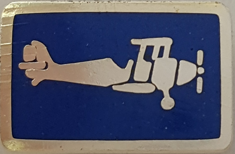 Botkyrka Flygklubbs klubbnål 1971